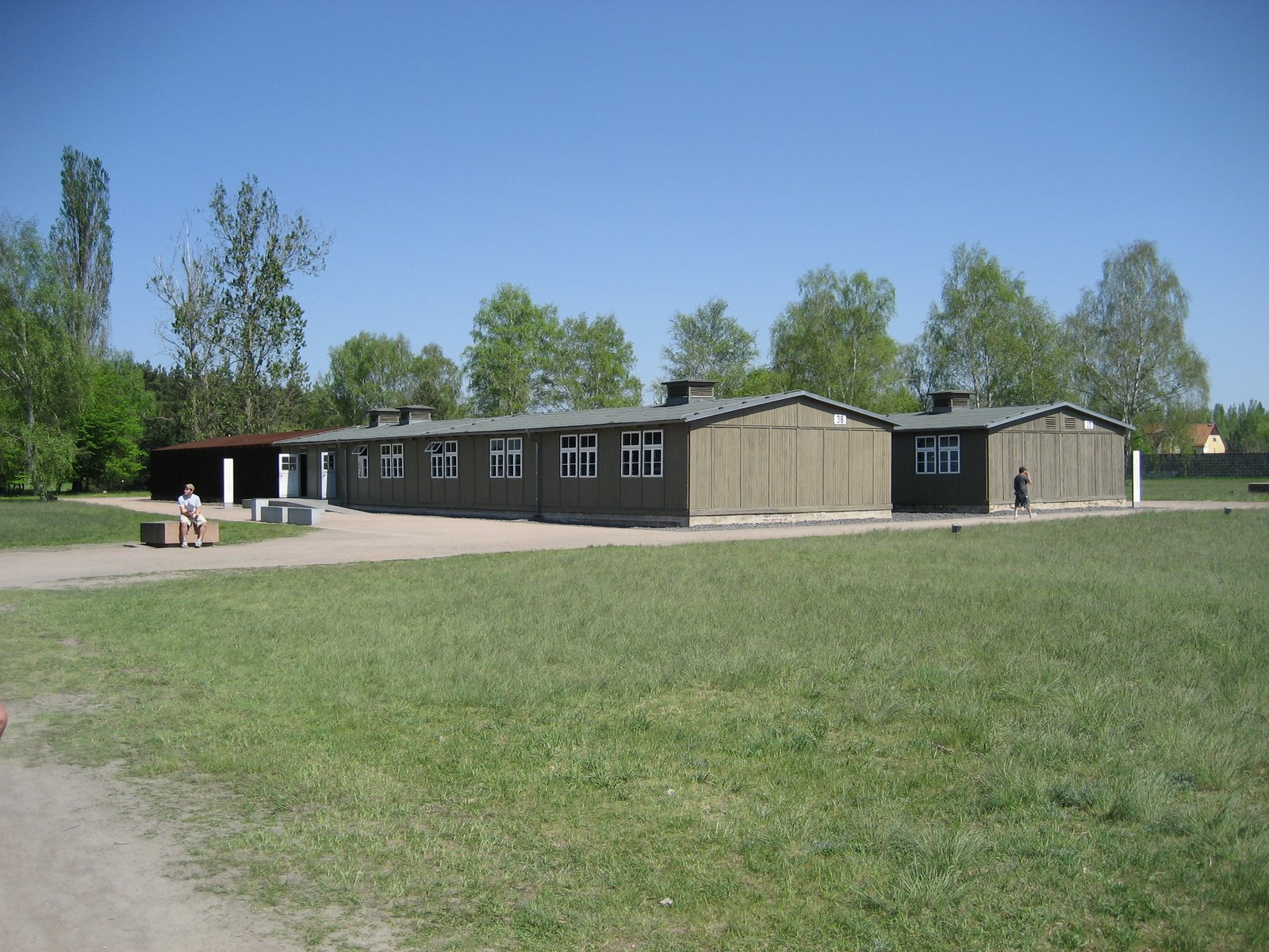 Sachsenhausen barracks